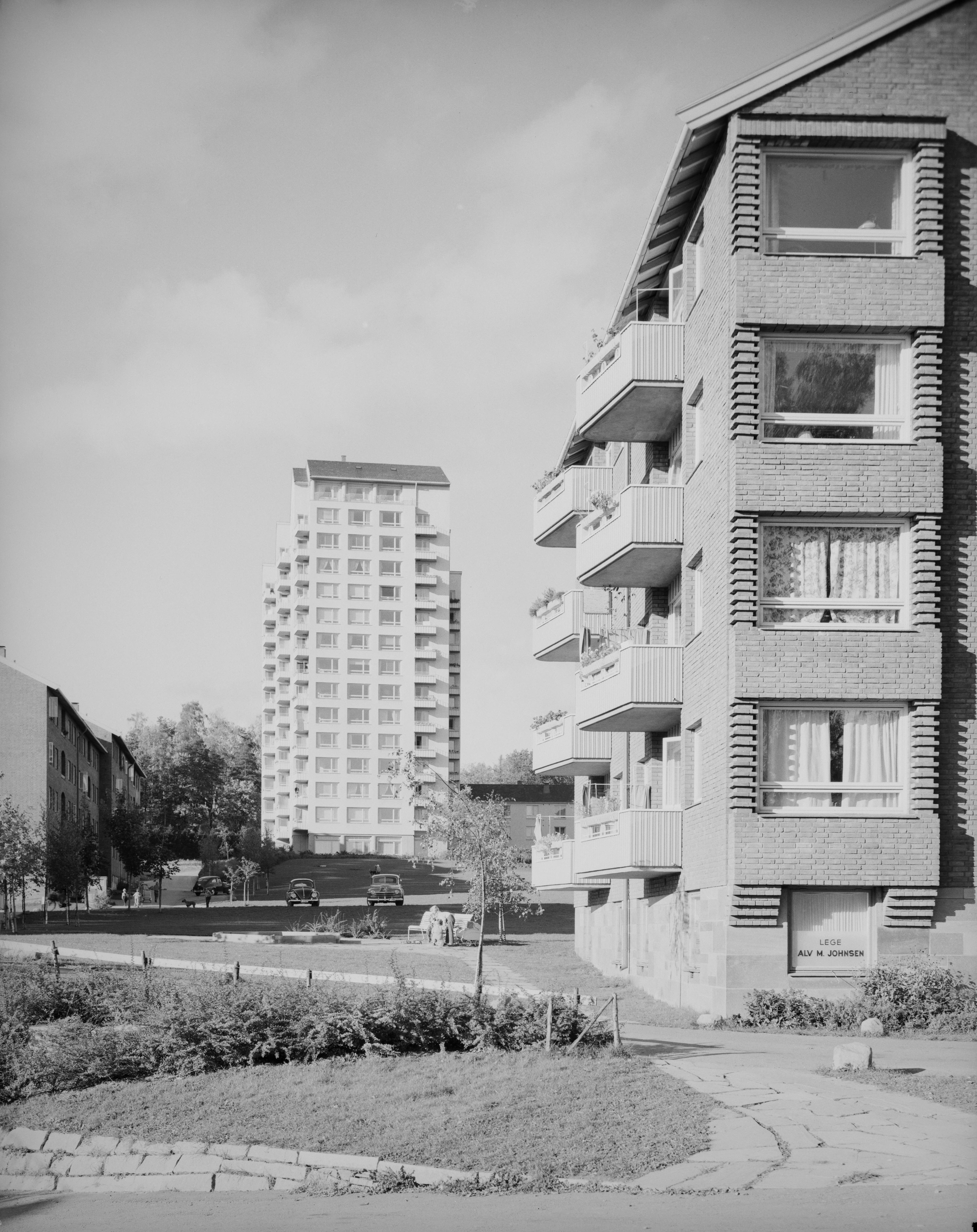 Bildet er hentet fra Nasjonalbibliotekets bildesamling Hoff,Oslo, Oslo, Oslo